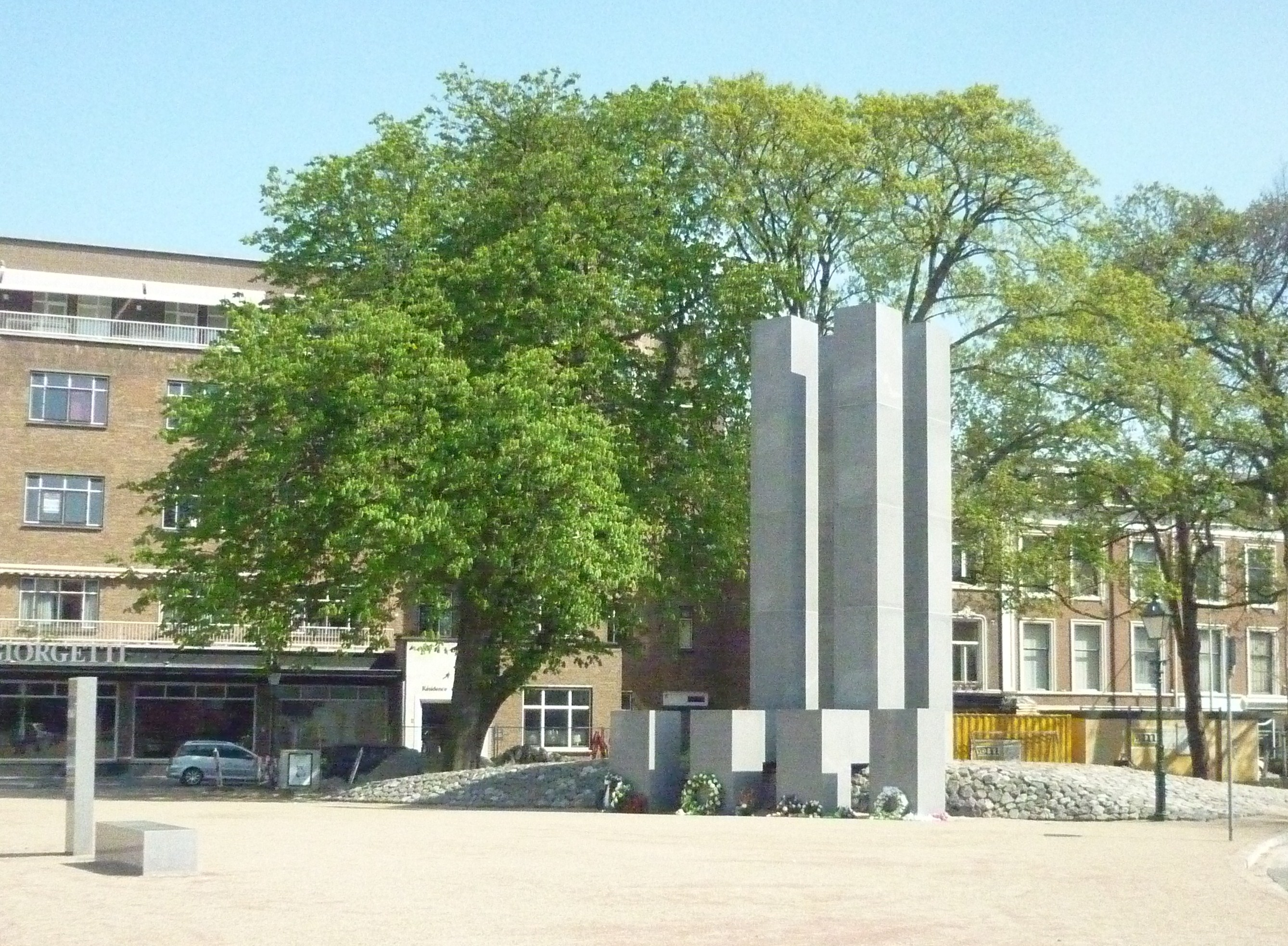 Oorlogsmonument en zuiltje bij Vredespaleis.